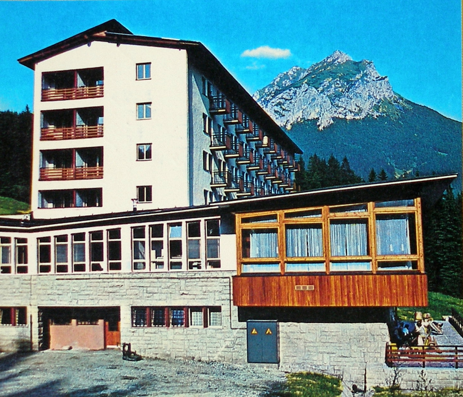 Hotel Boboty vo Vrátnej doline. Rok 1972.